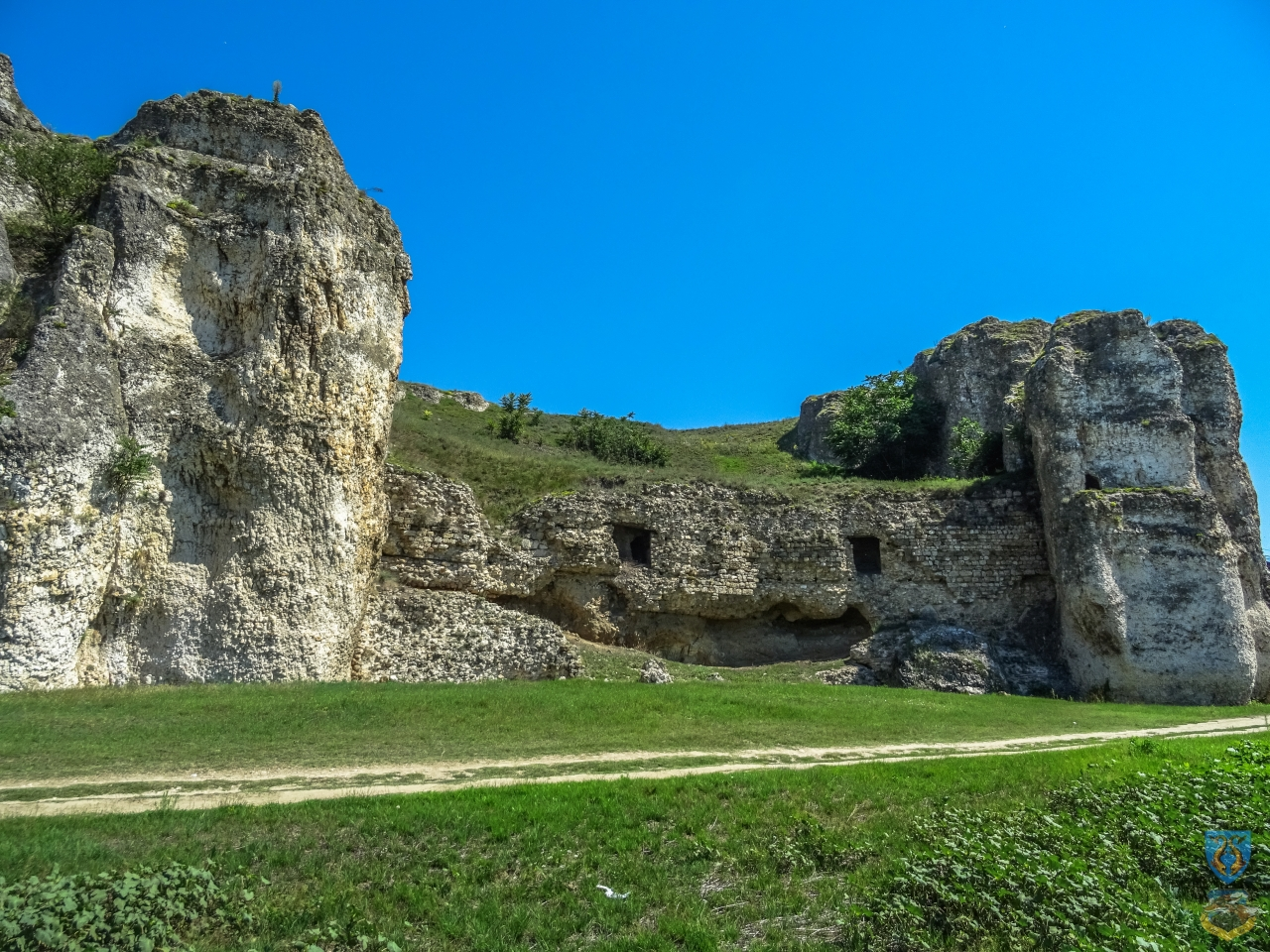 Cetatea medievală 01